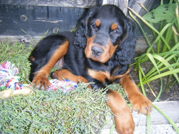 Bilde av Vårlihøgda's Tm Gordon Royal 8 uker gammel.